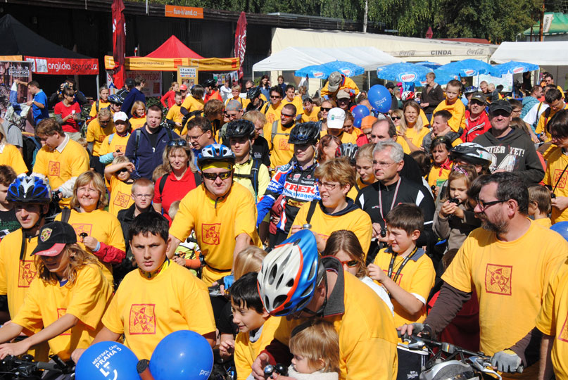 Česky: Překonání rekordu ve zvonění na Císařské louce v Praze.